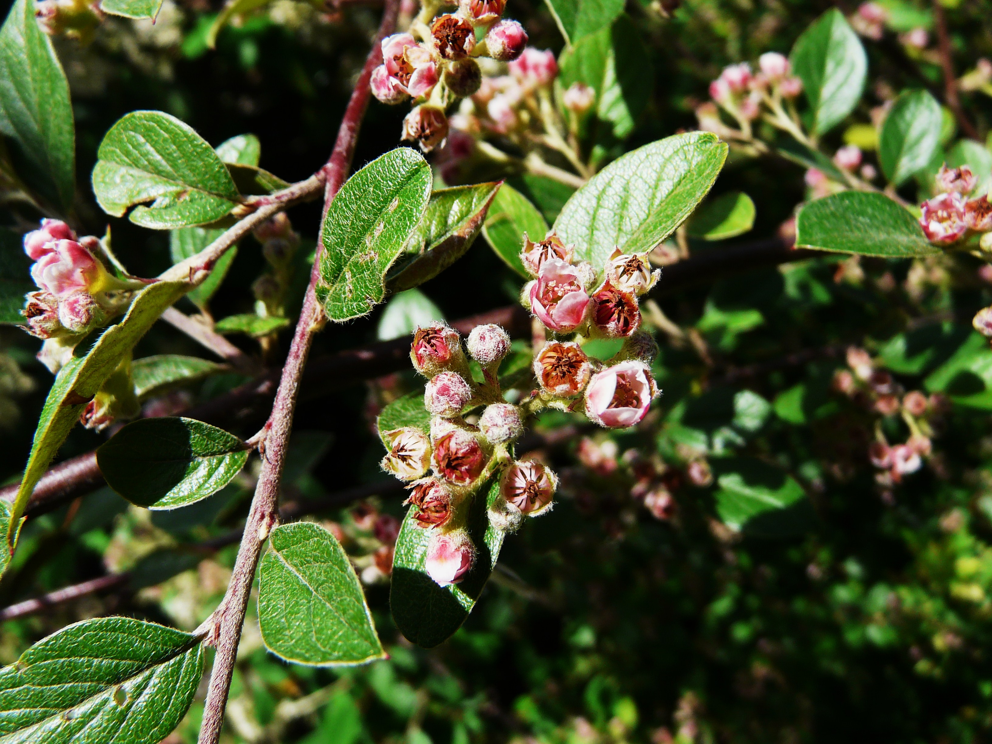 Corymbe avec fleurs ouvertes de Cotonéaster de Franchet (Cotoneaster franchetii), Dordogne, France